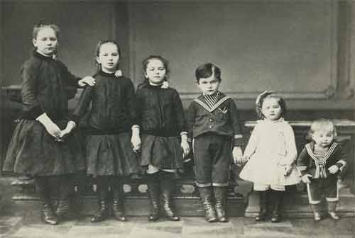 Дети Александра Бари: Анна, Ольга, Евгения, Виктор, Лидия, Владимир. Москва, 1 января 1889